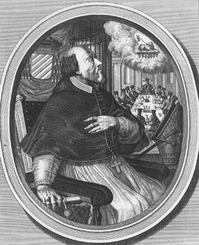 Aartsbisschop Frederik Schenck van Toutenburg